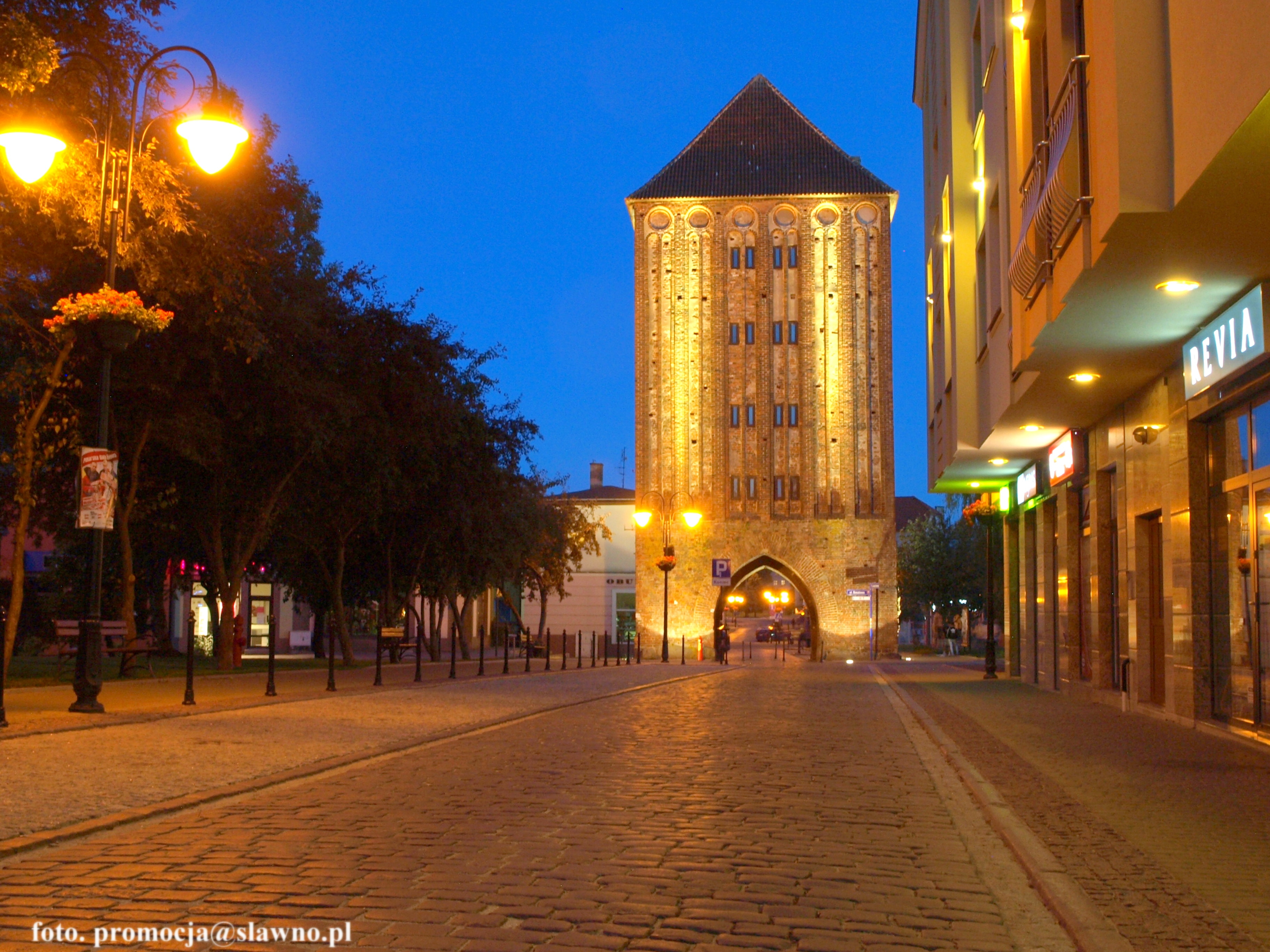 Widok na bramę nocą